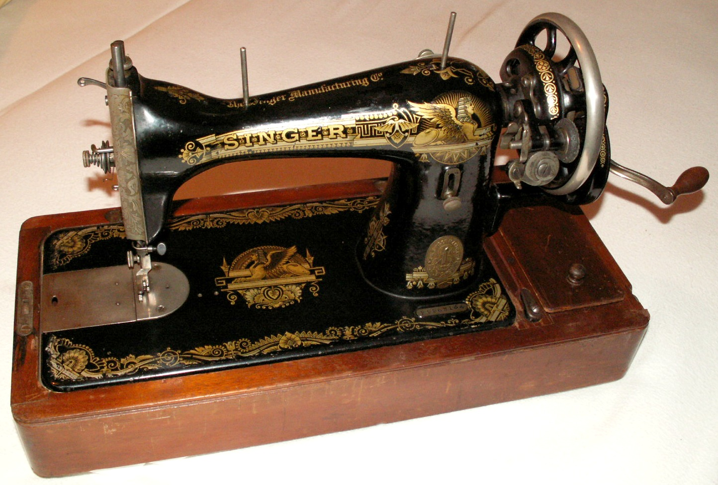 Summary Quelle: selbst fotografiert, 01/2006 Fotograf: Späth Chr. Lizenzstatus